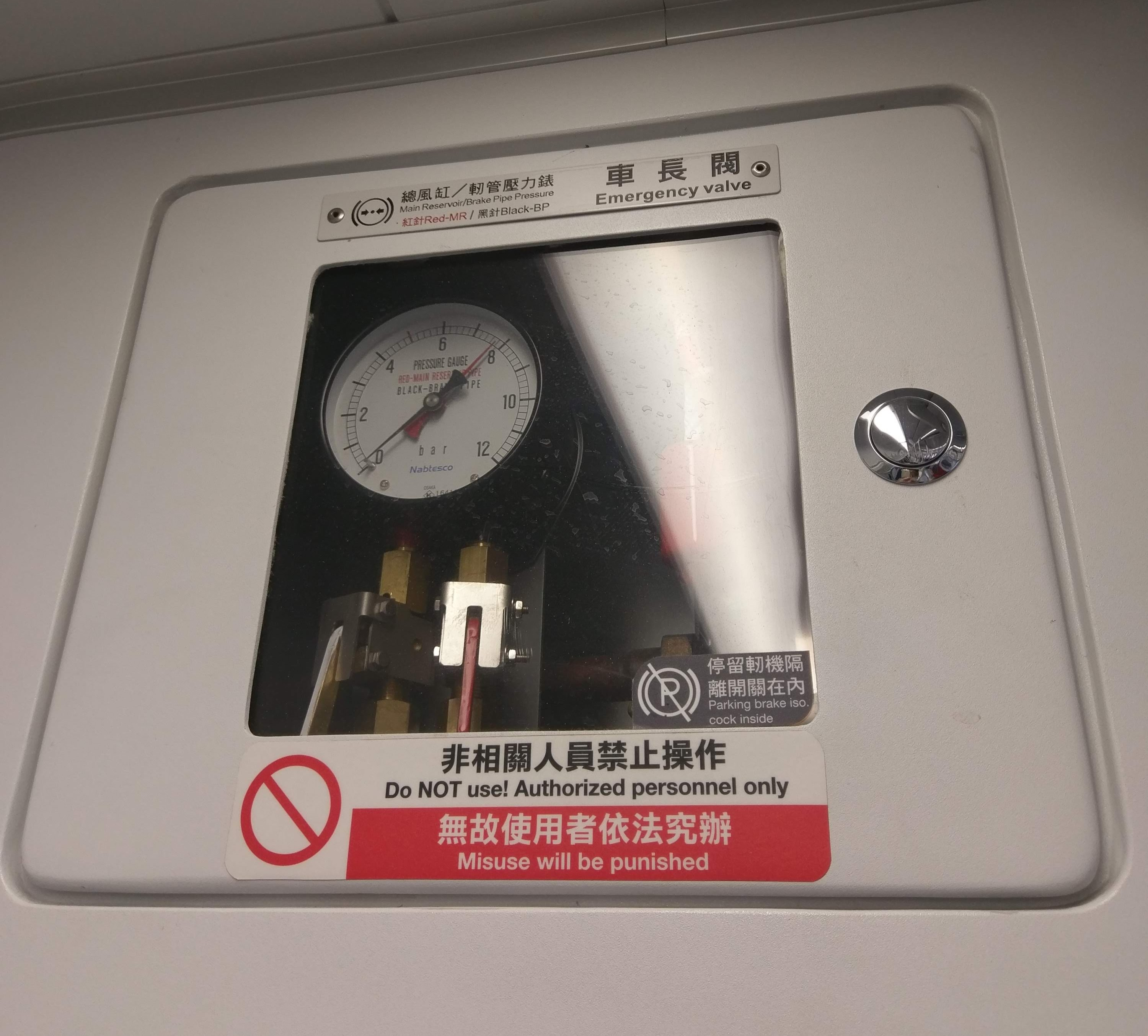 中文（台灣）: 台鐵EMU800型電聯車車內的車長閥